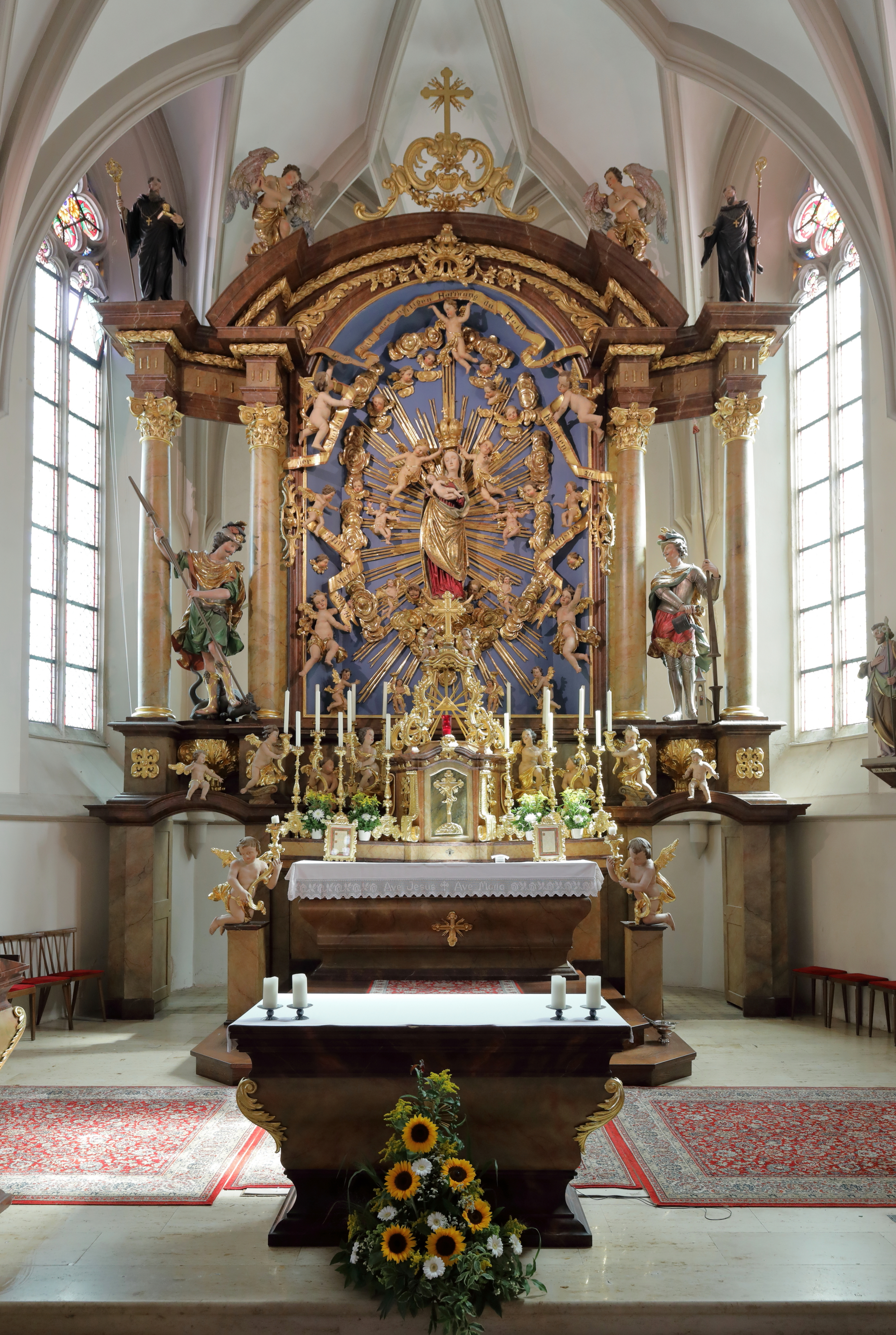 Hochaltar der röm.-kath. Pfarr- und Wallfahrtskirche hll. Maria und Oswald in der oberösterreichischen Gemeinde Maria Neustift.Der Gnadenaltar wurde urkundlich in den Jahren 1688 bis 1690 errichtet. Er wurde mehrmals verändert, zuletzt 1908. Die fast lebensgroße Statue „Maria mit dem Kinde“, ein bedeutendes und fein empfundenes Werk aus dem Jahr 1450, ist von einem zierlichen Strahlenkranz und einem lebhaften Engelreigen umgeben. Seitlich befinden sich die Figuren St. Florian sowie St. Georg und auf den Säulenkapitellen die Figuren St. Benedikt sowie St. Berthold.